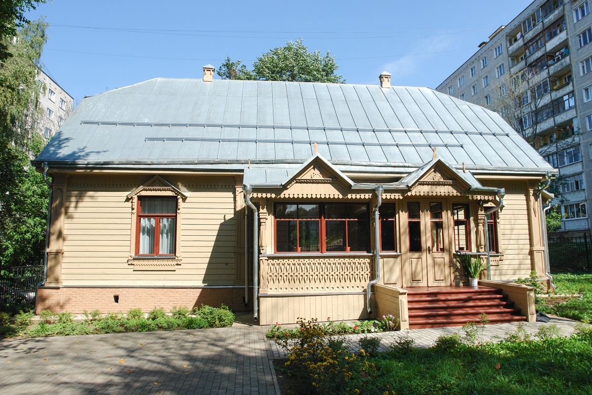 Дом П.А. Кропоткина. Музей-заповедник "Дмитровский кремль"